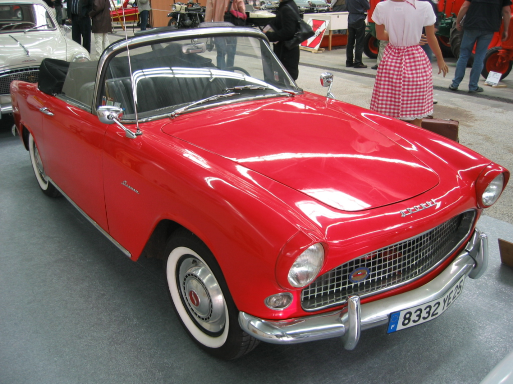 Simca Aronde Oceane